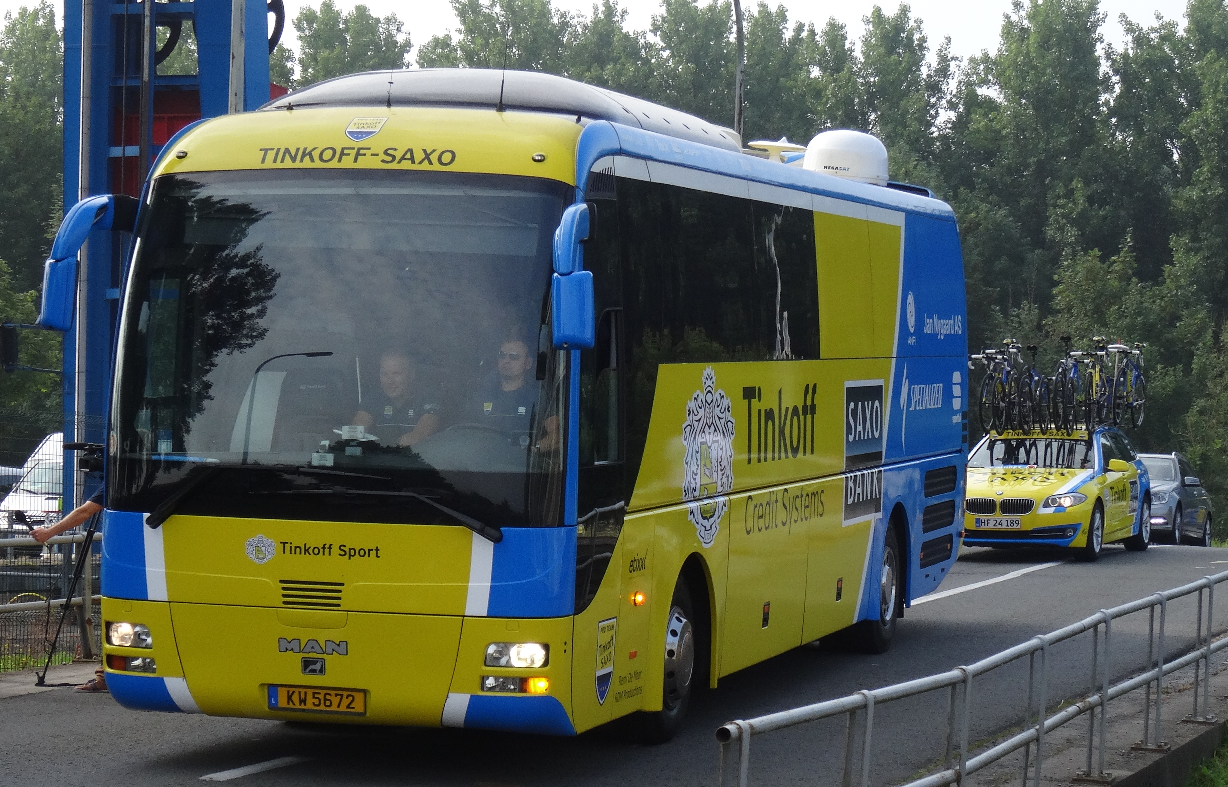 Reportage photographique réalisé le dimanche 27 juillet à l'occasion du départ de la deuxième étape du Tour de Wallonie 2014 à Péronnes-lez-Antoing (Antoing), Belgique.